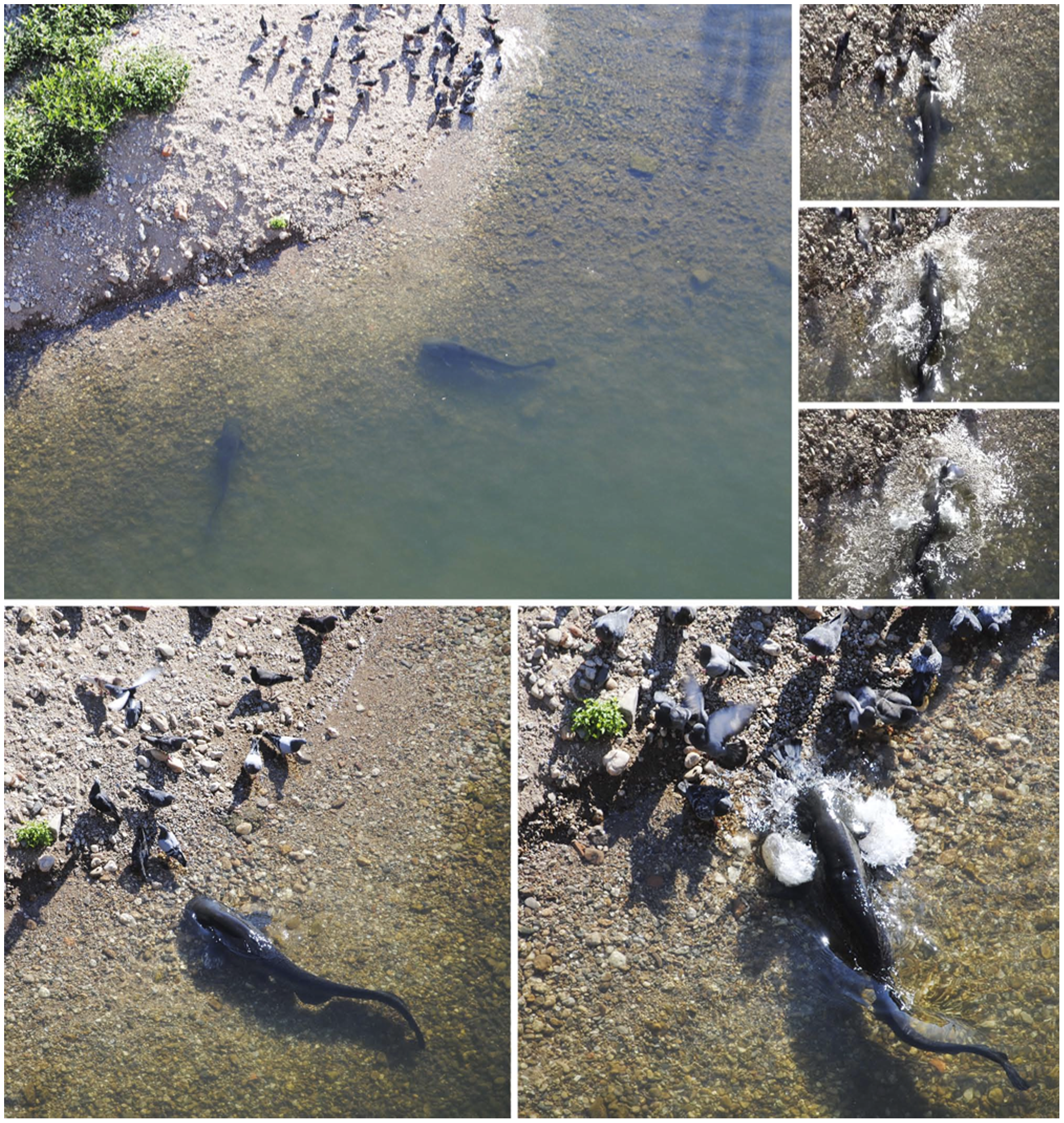 Silures pratiquant l'échouage volontaire dans le Tarn pour capturer des pigeons